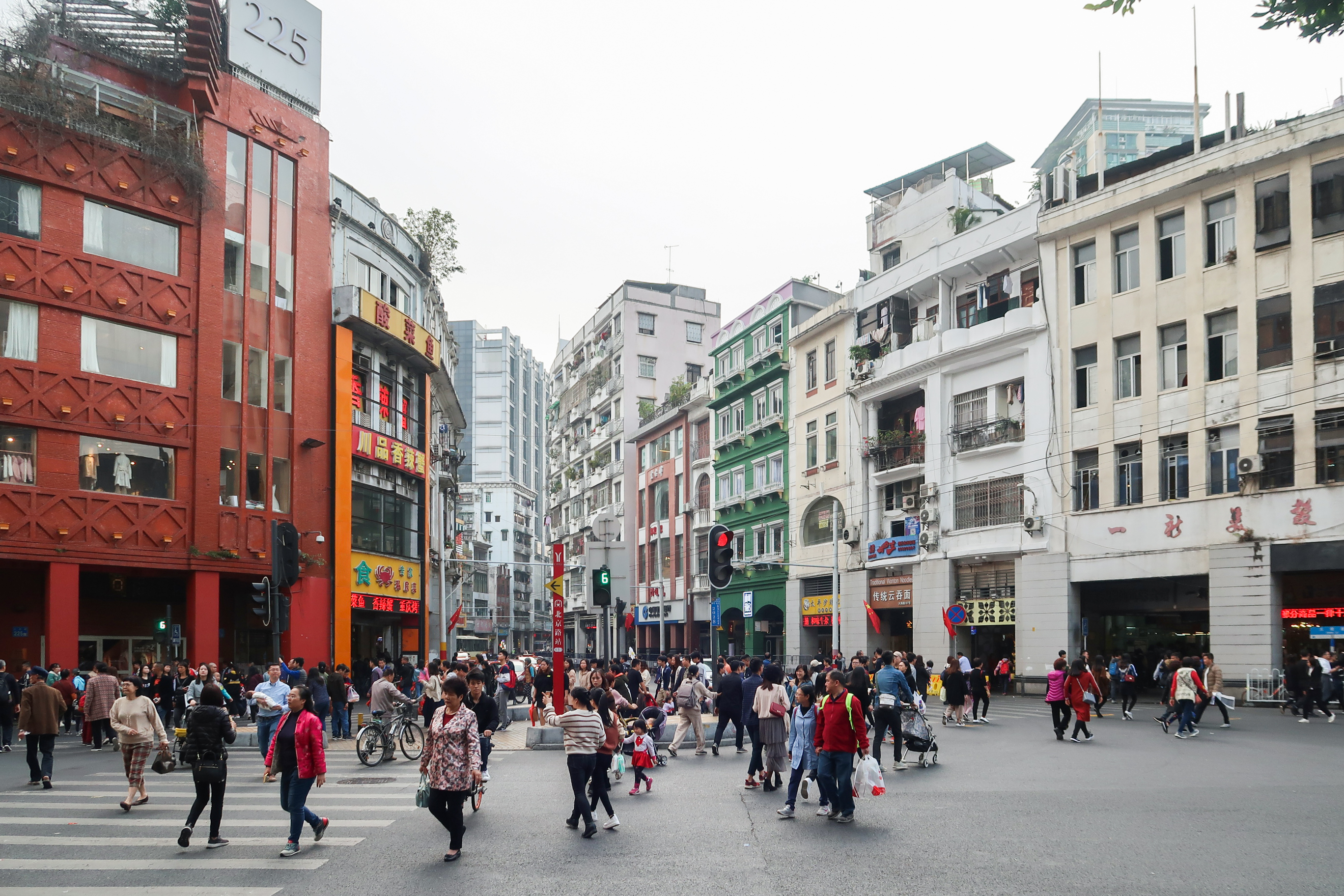 Danan Lu buildings